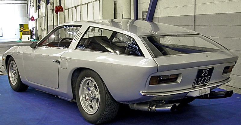 Lamborghini Flying Star Heckansicht